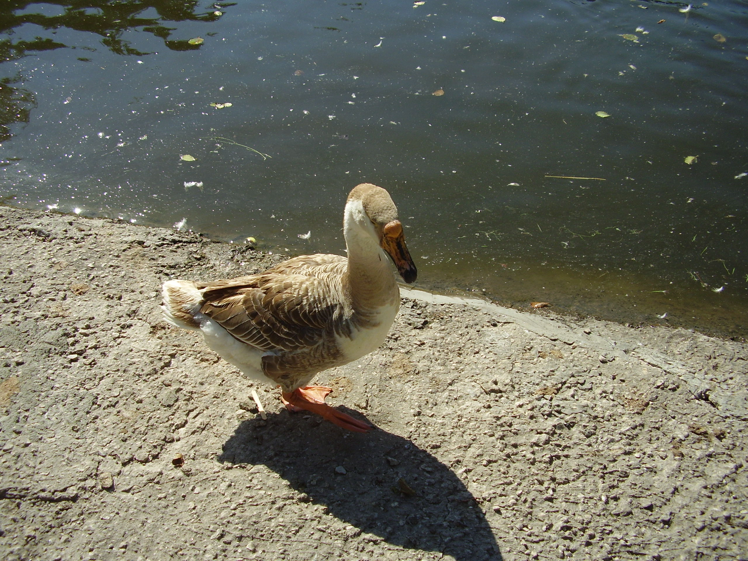 Гусь в Липецком зоопарке